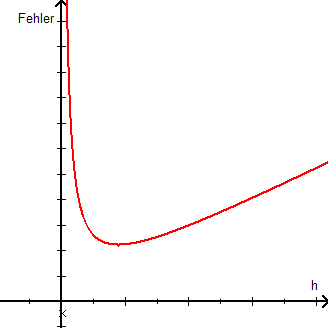 Darstellung des Gesamtfehlers aus Rundungsfehler und Verfahrensfehler